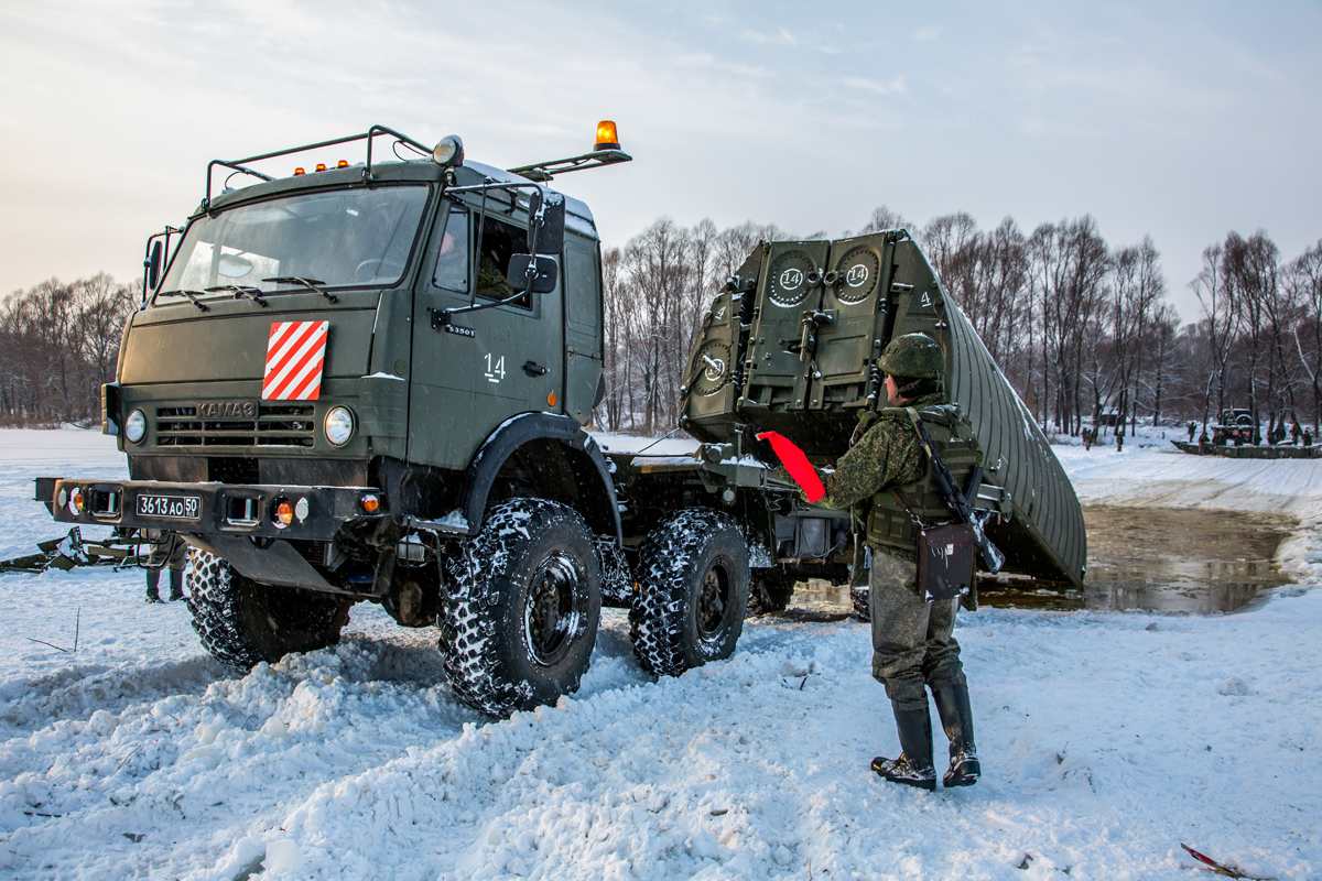 Наведение военнослужащими 28-й отдельной понтонно-мостовой бригады понтонной переправы через реку Оку (г. Муром)